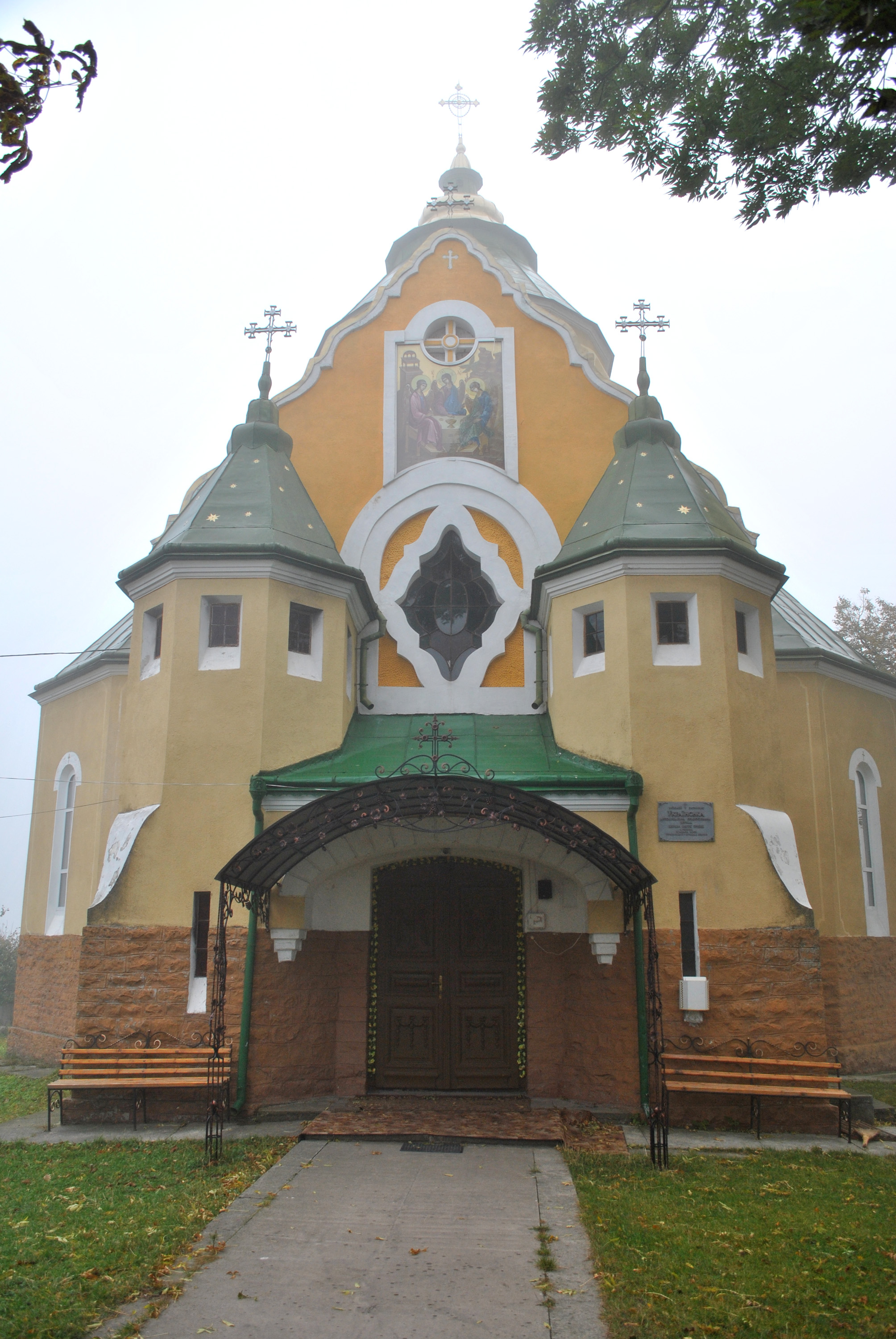 Церква Святої Трійці (мур.) у селі Пишківці Бучацького району Тернопільської області.